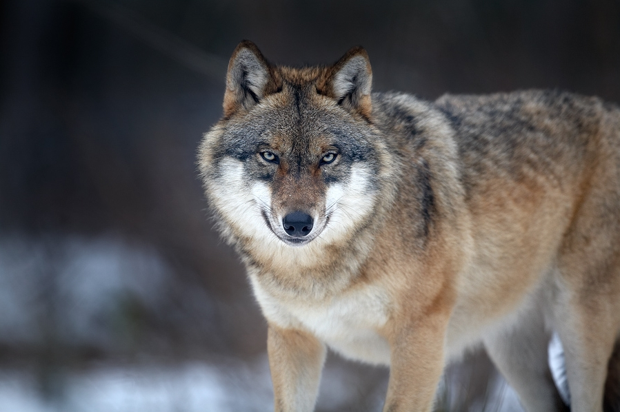 Canis lupus, Nationalpark Bayerischer Wald, Deutschland